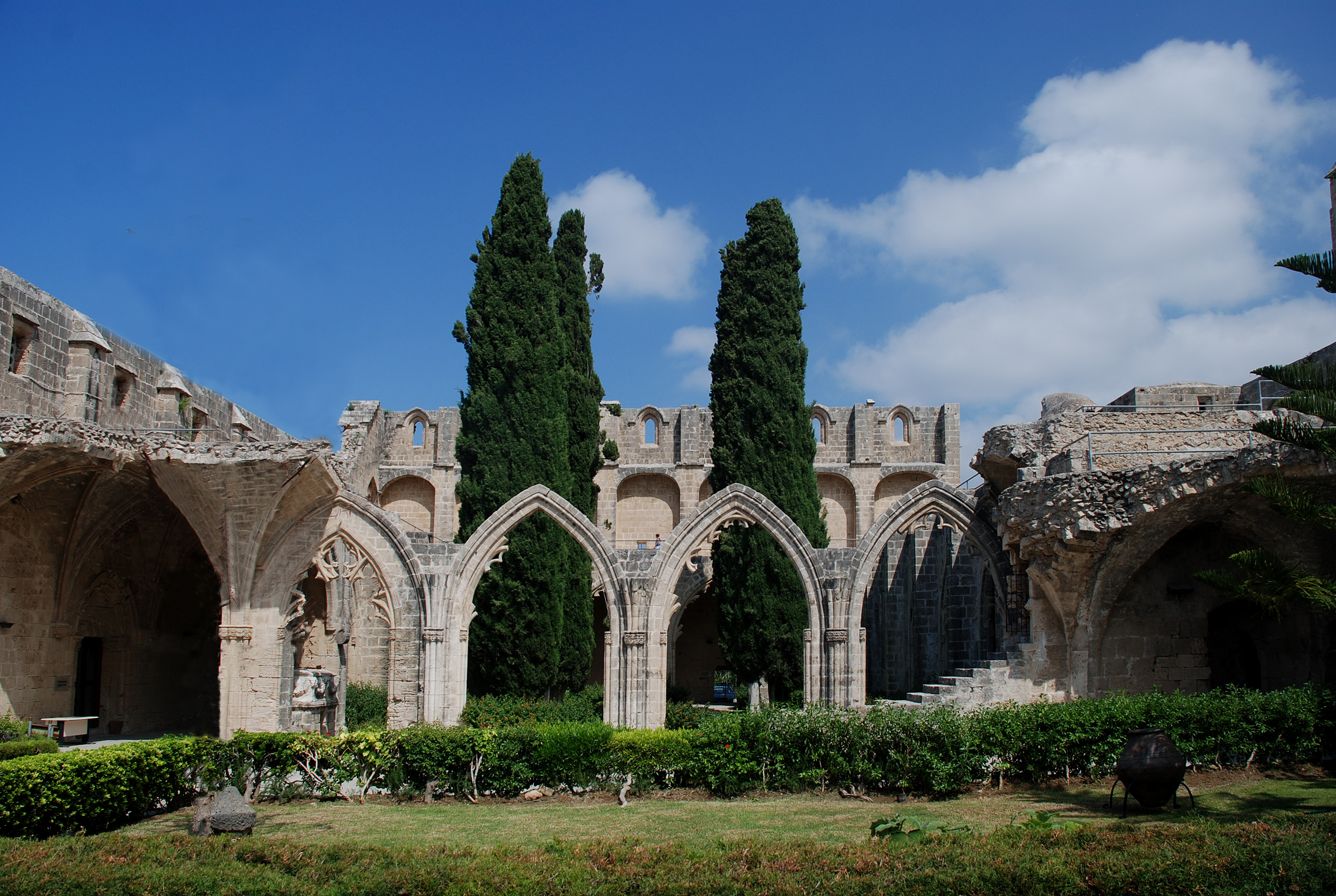 Bellapais, Girne, Nordzypern: Hof der Klosteranlage